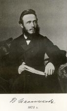 Владимир Степанович Иконников, 1873 год.